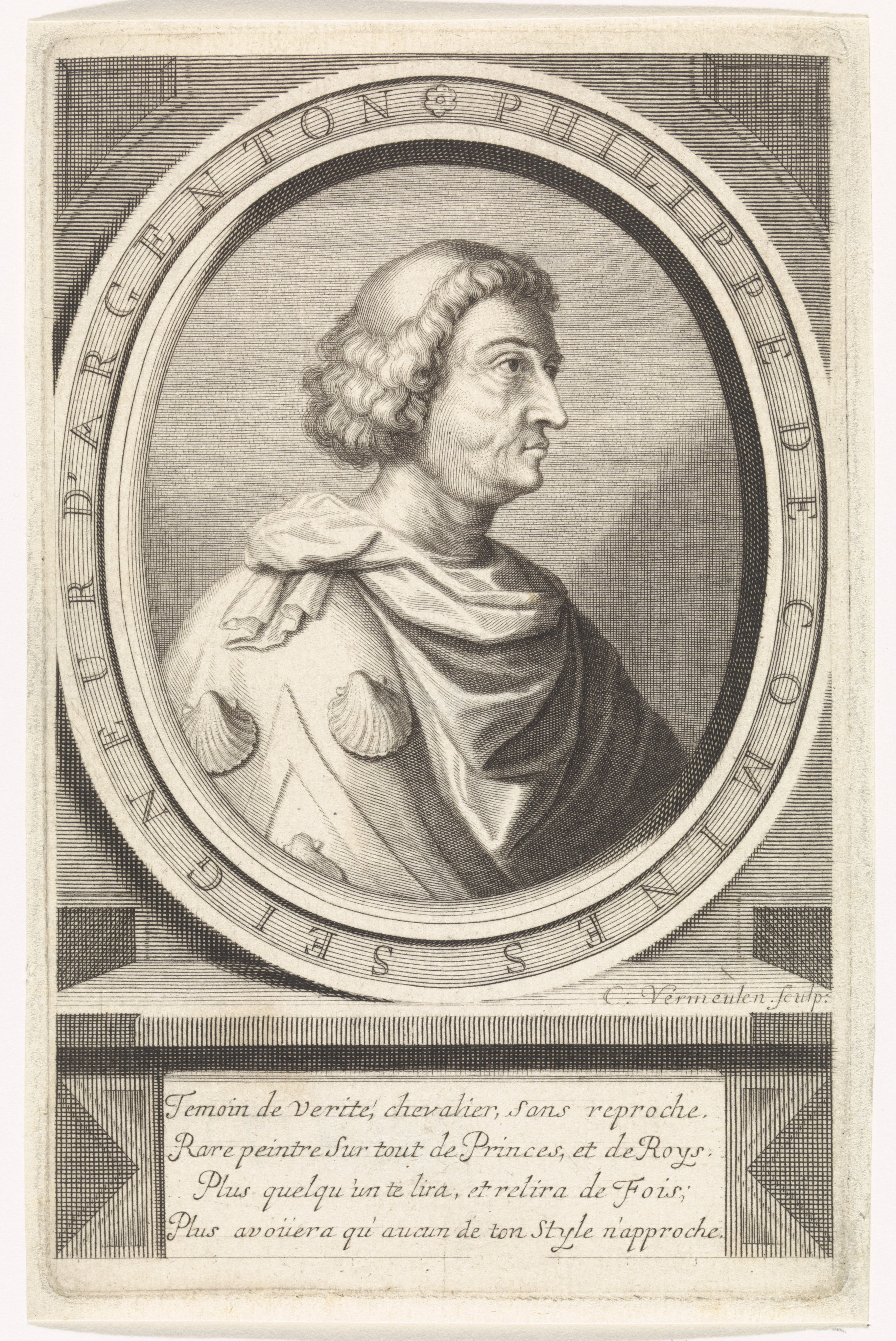 IdentificatieTitel(s): Portret van Philippe de CominesObjecttype: prent Objectnummer: RP-P-1909-623Catalogusreferentie: Hollstein Dutch 193-2(2)Opschriften / Merken: verzamelaarsmerk, verso, gestempeld: Lugt 2228Omschrijving: Portret van Philippe de Comines, heer van Argenton.VervaardigingVervaardiger: prentmaker: Cornelis Martinus Vermeulen (vermeld op object)Plaats vervaardiging: AntwerpenDatering: 1654 - 1706Fysieke kenmerken: gravureMateriaal: papier Techniek: graveren (drukprocedé)Afmetingen: plaatrand: h 155 mm × b 98 mmOnderwerpWie: Filips van KomenVerwerving en rechtenCredit line: Schenking van de heer H.P. Gerritsen, Den HaagVerwerving: schenking 1909Copyright: Publiek domein